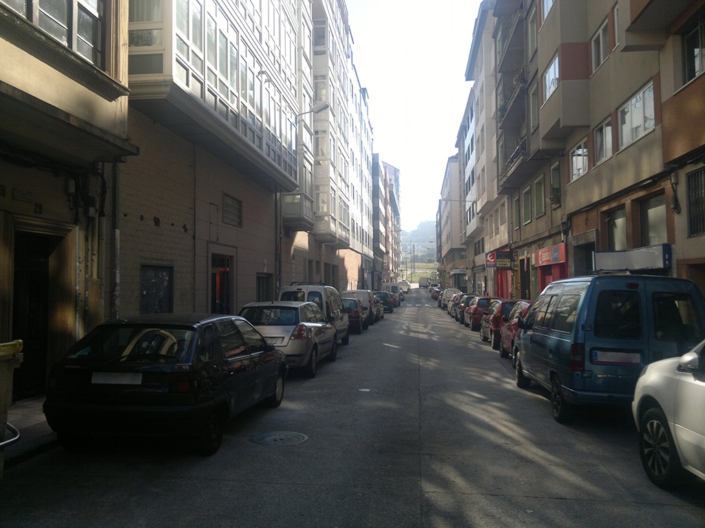 Ver o título.